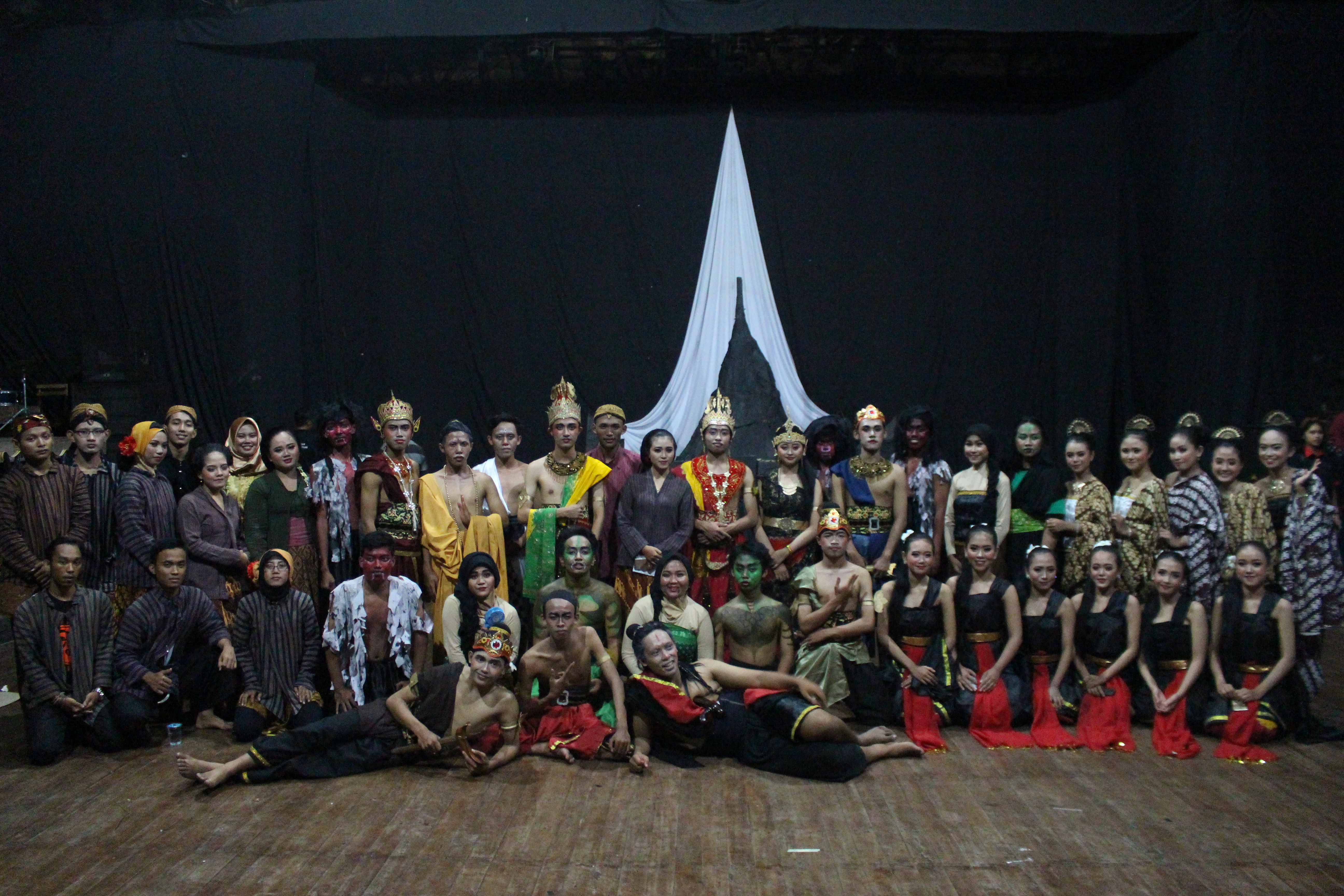 Basa Jawa: Pentas HUT Unit Pengembangan Kesenian Daerah UNS diadakake ing Teater Arena Taman Budaya Jawa Tengah. Pentas kasebut arupa kethoprak kang digawe kathi tampilan kang beda kaya padatan lan luwih narik kawigaten. Pentas kethoprak kasebut irah-irahane yaiku "BHUMI SAMBHARA BUDHARA".